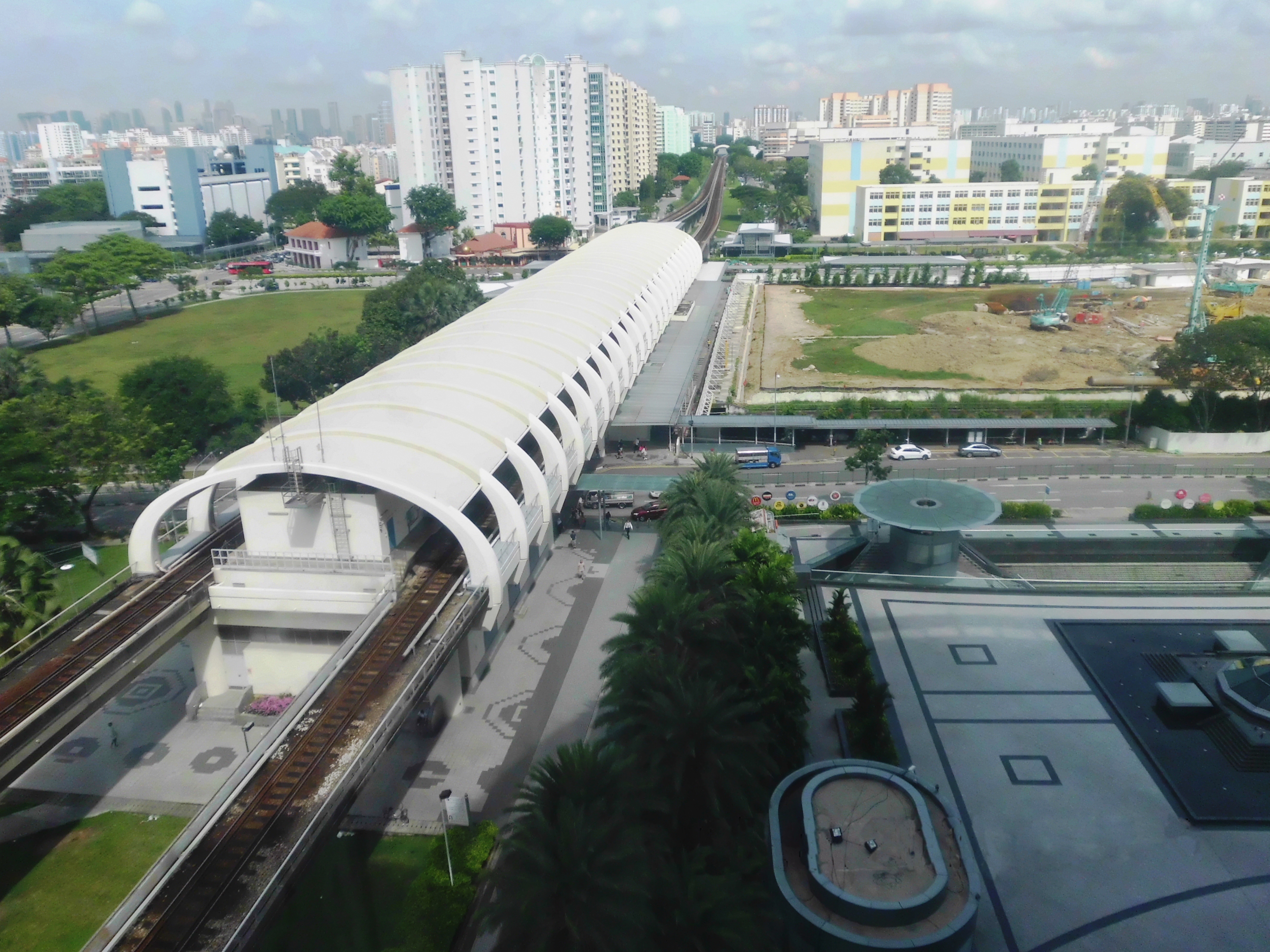 Paya Lebar MRT Station